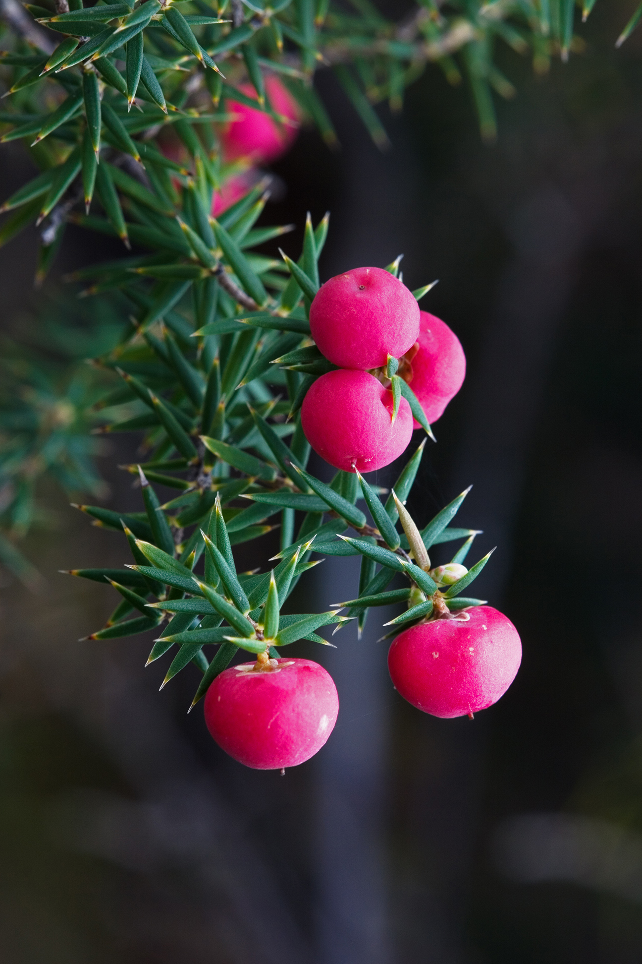 Leptecophylla juniperina, Cape Raoul, Tasman Peninsula, Tasmania, Australia